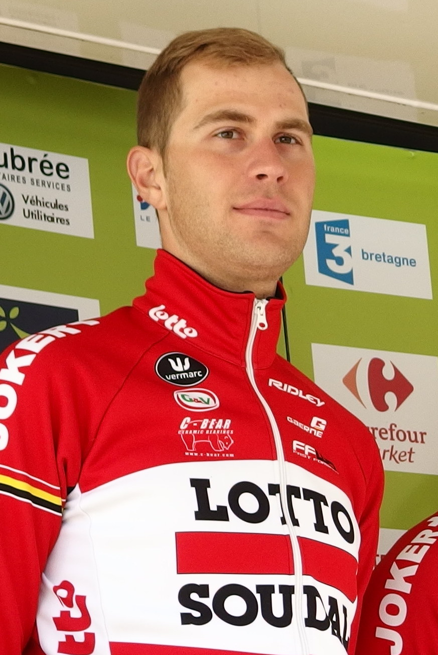 Tour de Bretagne 2015 - Présentation des équipes au départ de la troisième étape à Baud - Équipe Lotto-Soudal U23 Depicted person: Frederik Frison